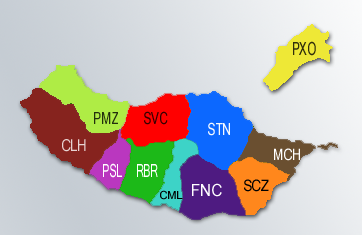 Imagem da Ilha da Madeira assinalando a sua divisão administrativa, com UN-LODODEs dos onze municípios